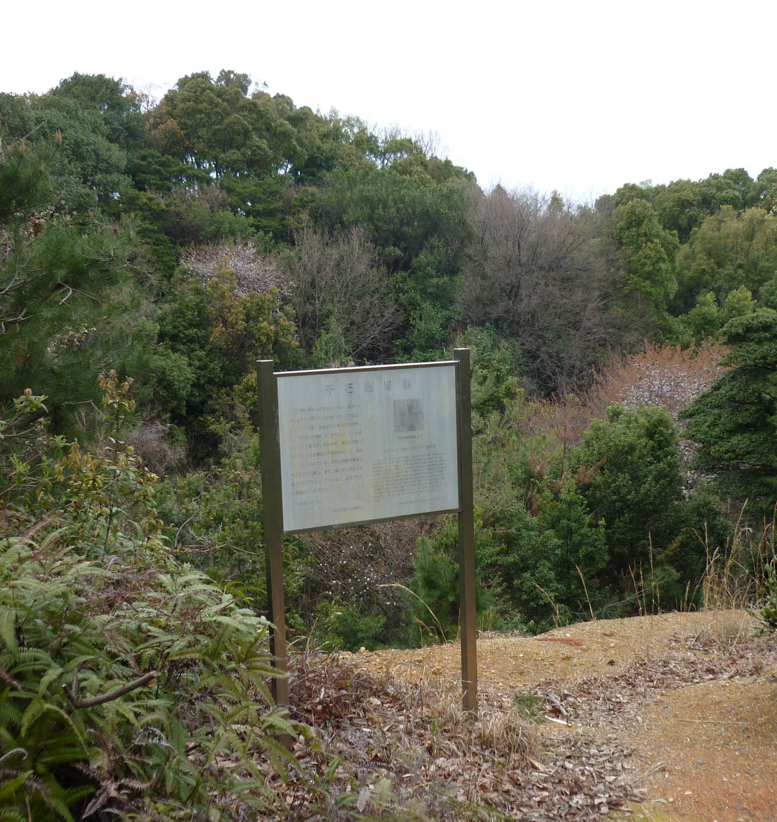 千石堀城の案内看板